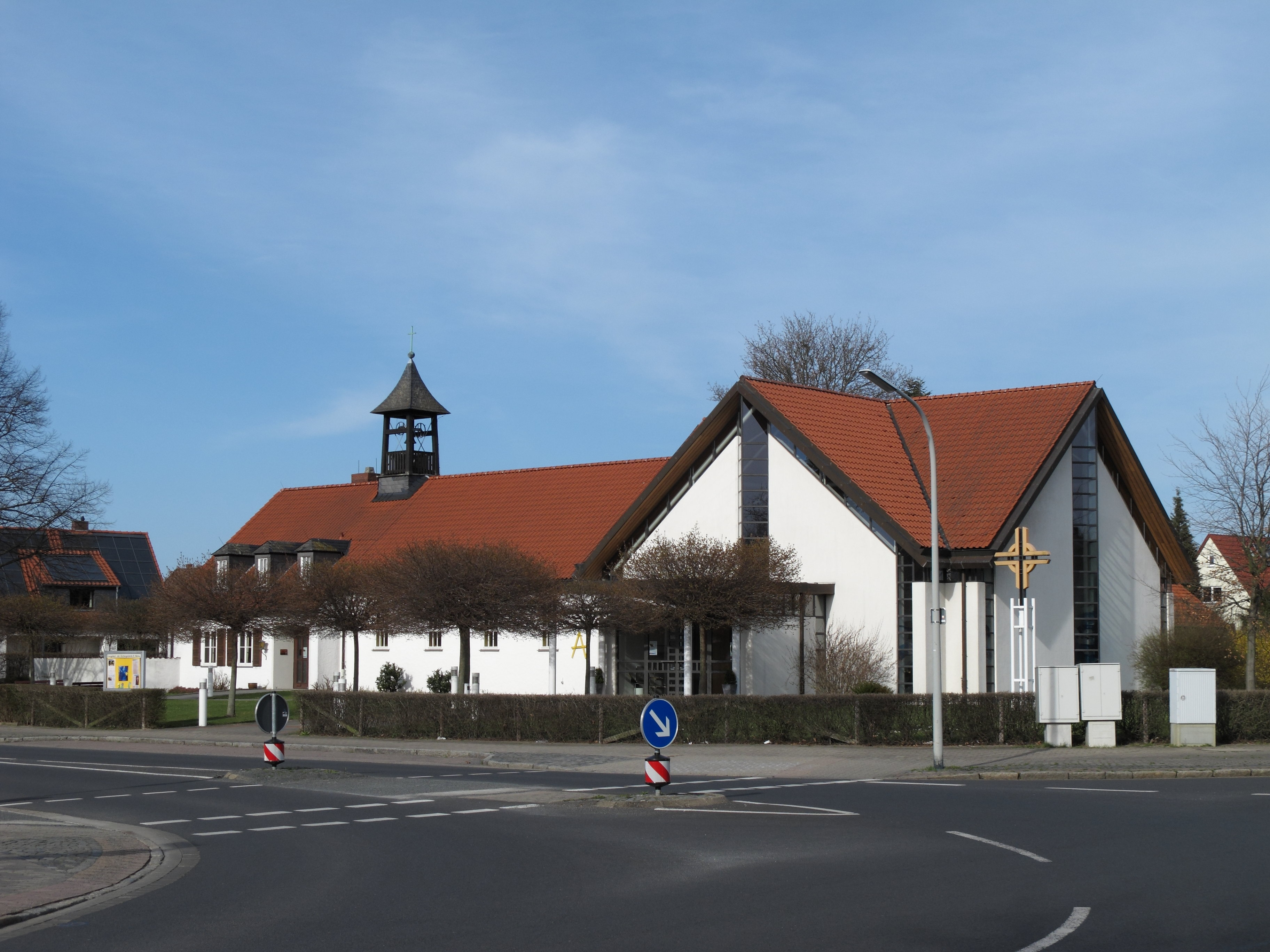 Braunschweig, Sankt-Markus-Kirche, Heidehöhe 28, 38126 Braunschweig. Das Gebäude wurde nach Plänen von Norbert Koch errichtet und 1999 fertiggestellt.